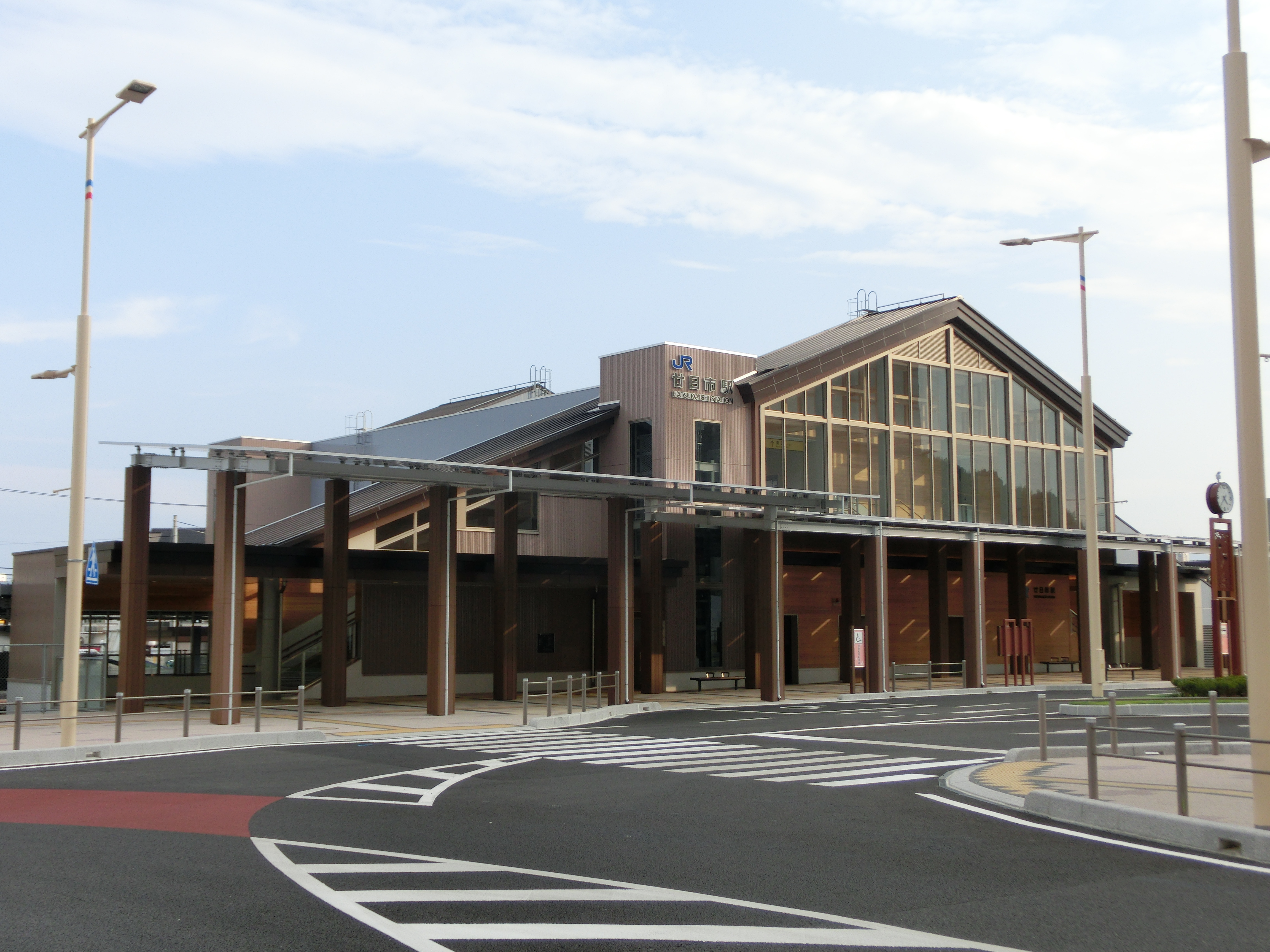 廿日市駅北口駅舎